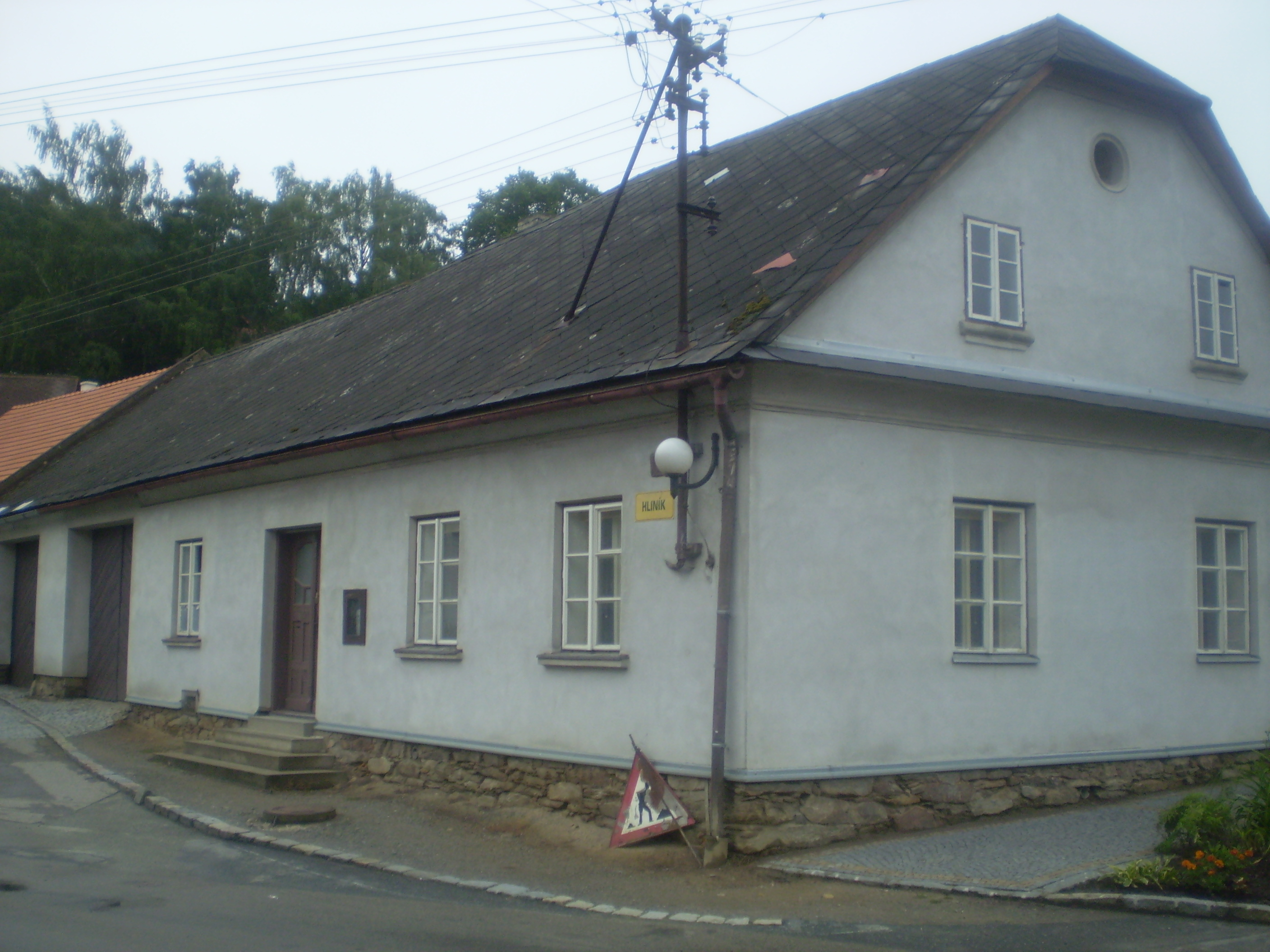 Dům v ulici Hliník čp. 87 v Jimramově, v němž se narodil Josef Laštovica